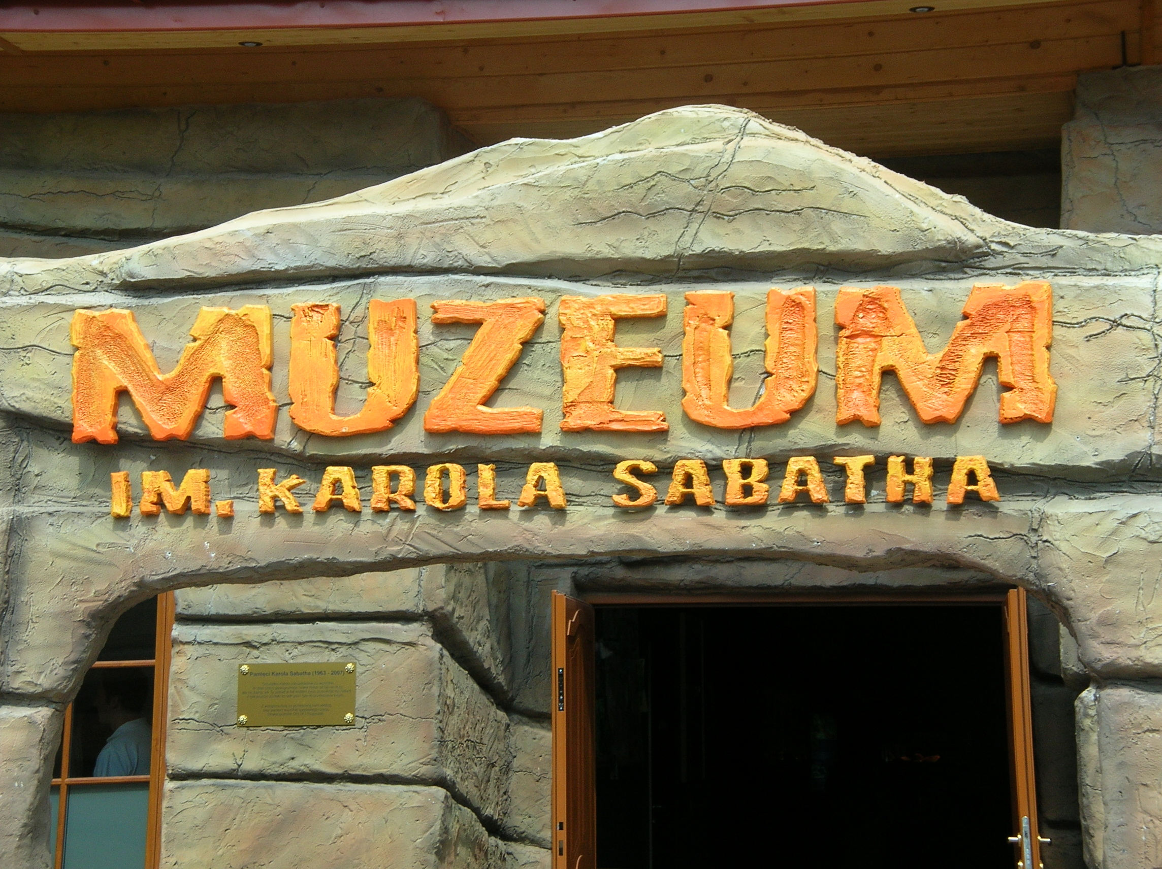 Museum at Solec Kujawski